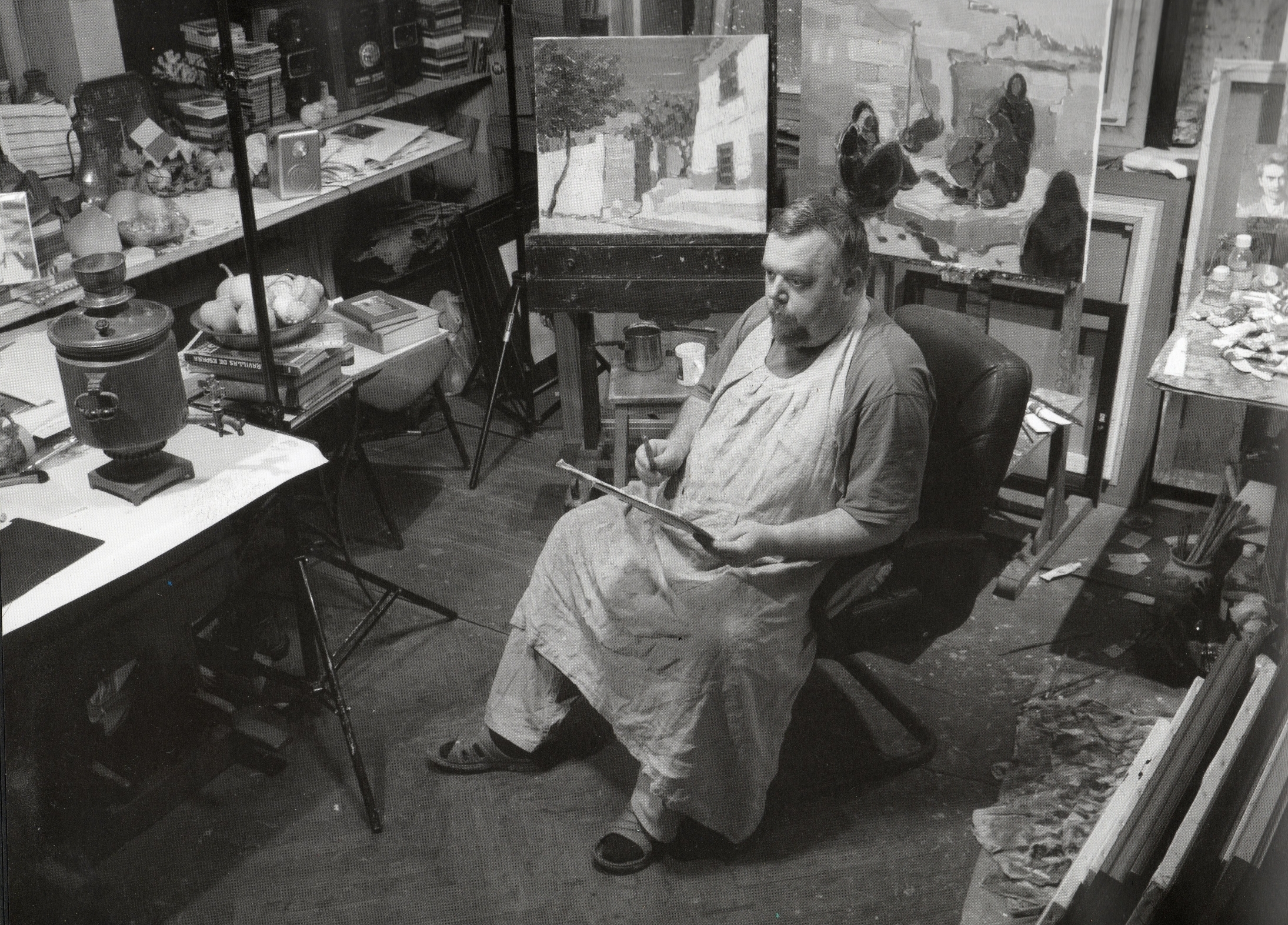 Sorin Adam - Atelier.